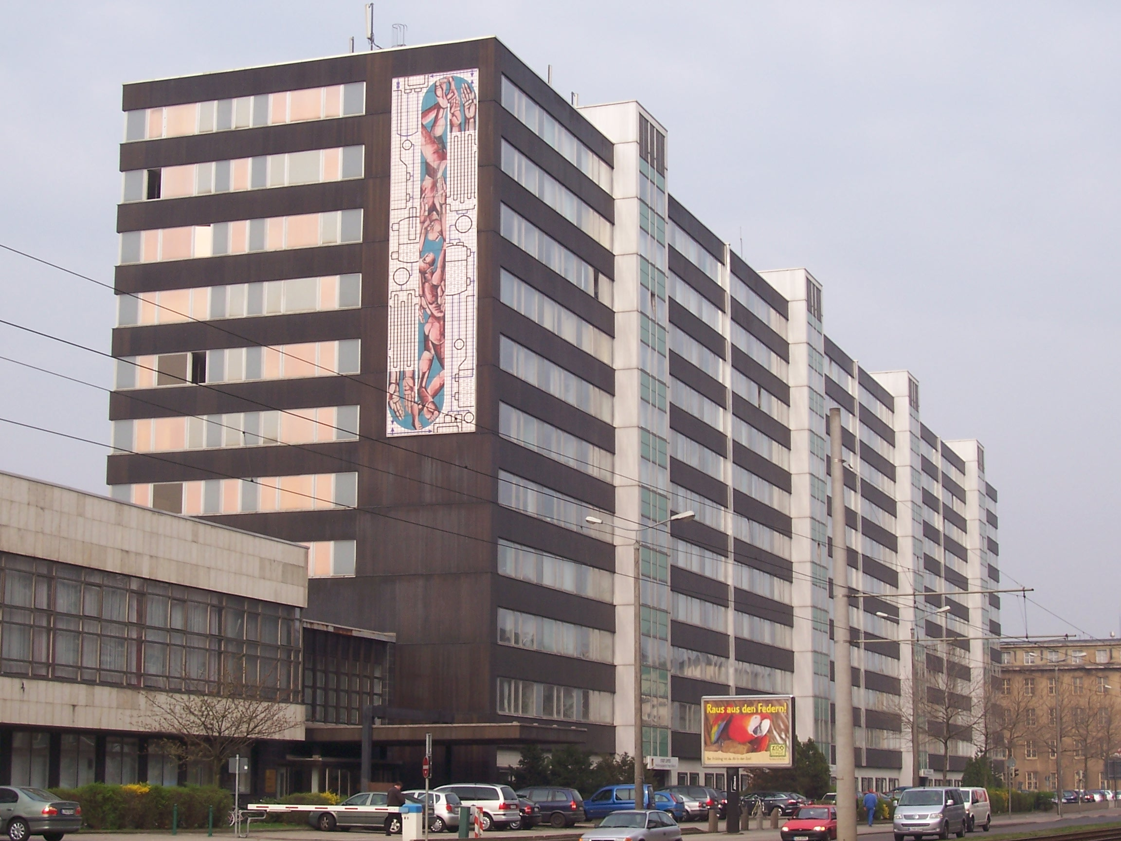 Städtisches Verwaltungzentrum in der Prager Straße in Leipzig